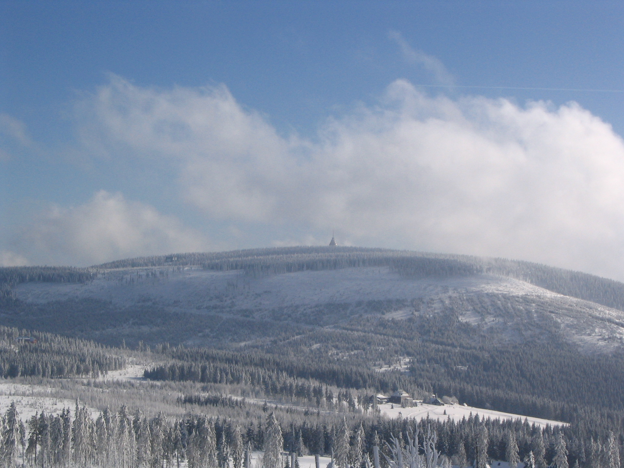 Černá hora